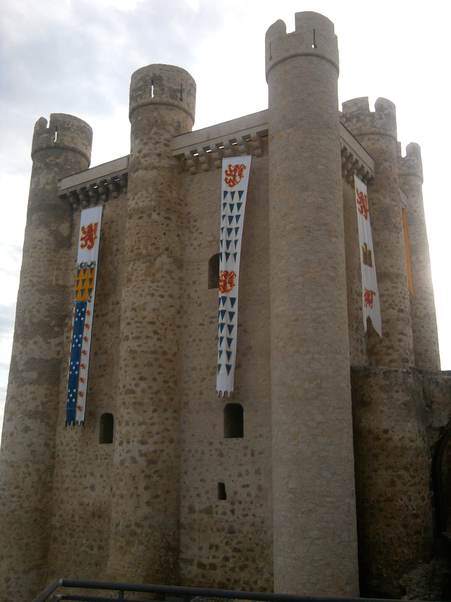 Torre del homenaje del Castillo de Valencia de Don Juan (en la provincia de León, España), decorada con diversos estandartes con motivos de los Acuña para la celebración de las Jornadas Medievales del año 2011.